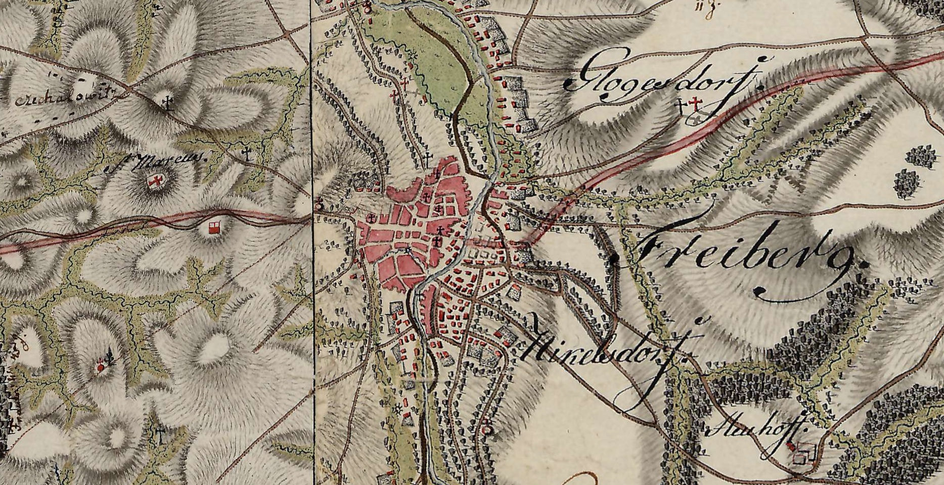 Příbor na Prvním vojenském mapování